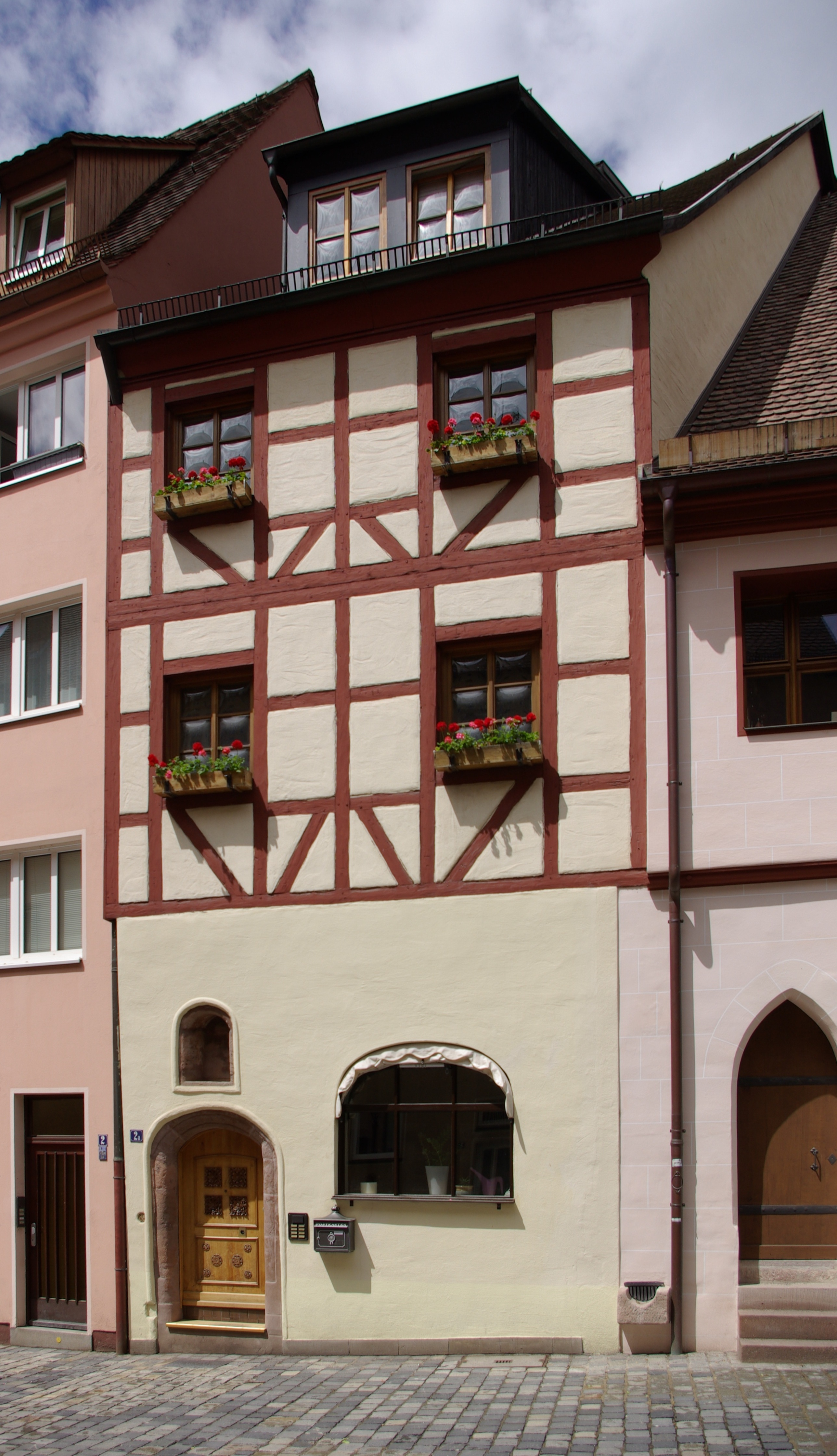 Irrerstraße 3 / Weißgerbergasse 2a (Fassade an der Weißgerbergasse) in Nürnberg